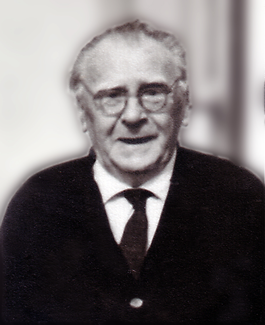 השל פרומקין